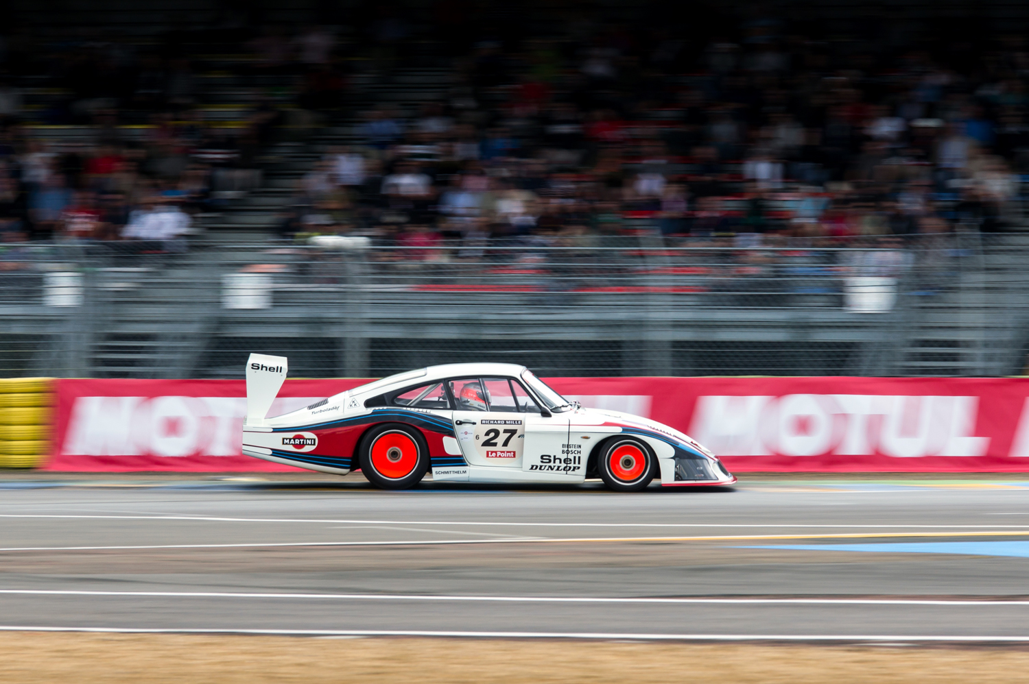 Le Mans Classic 2012 Vendredi 06 Juillet 2012 Plateau 6 : PORSCHE 935 Moby Dick 1978